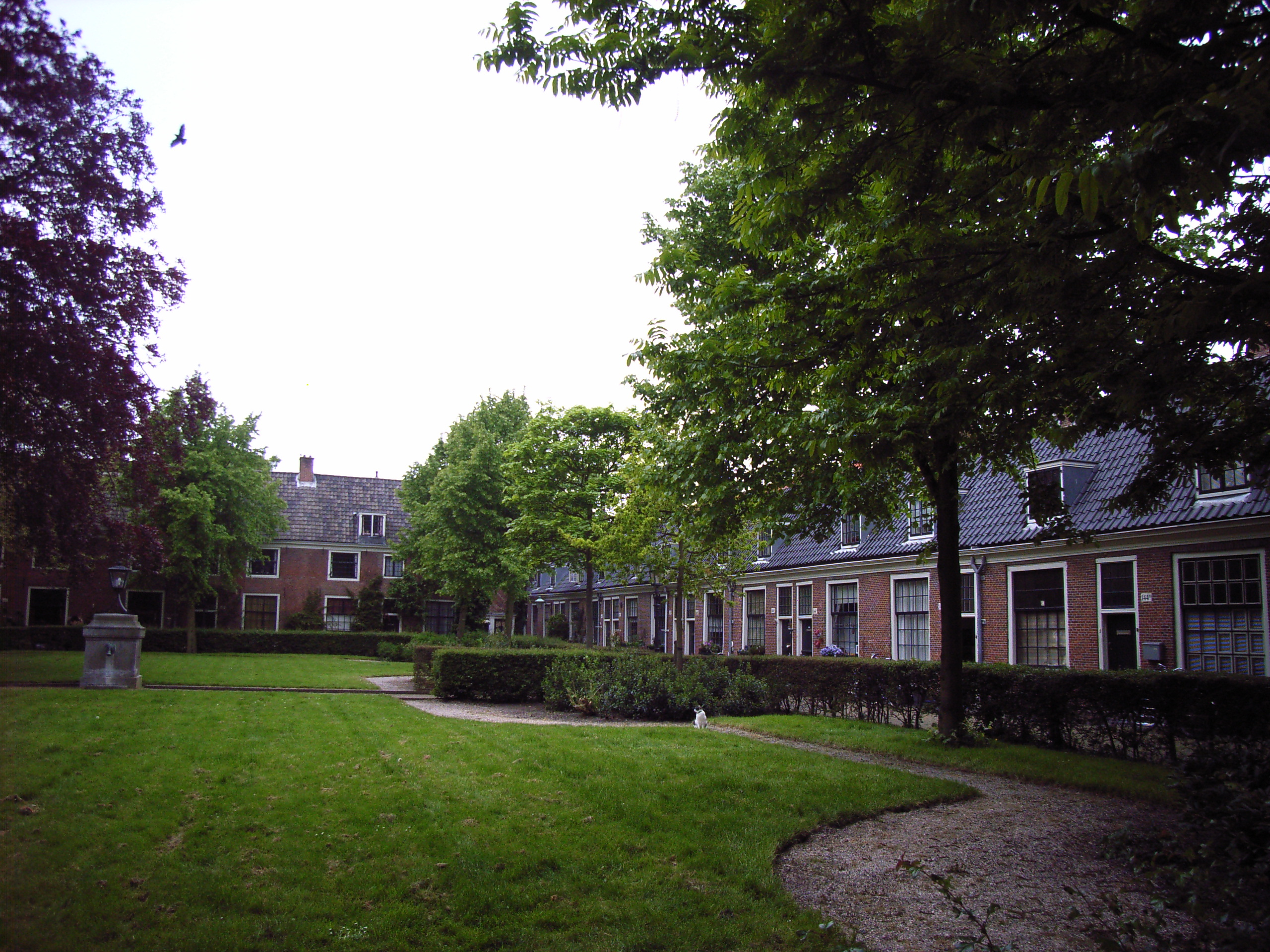 Proveniershof, Grote Houtstraat, Haarlem, Netherlands